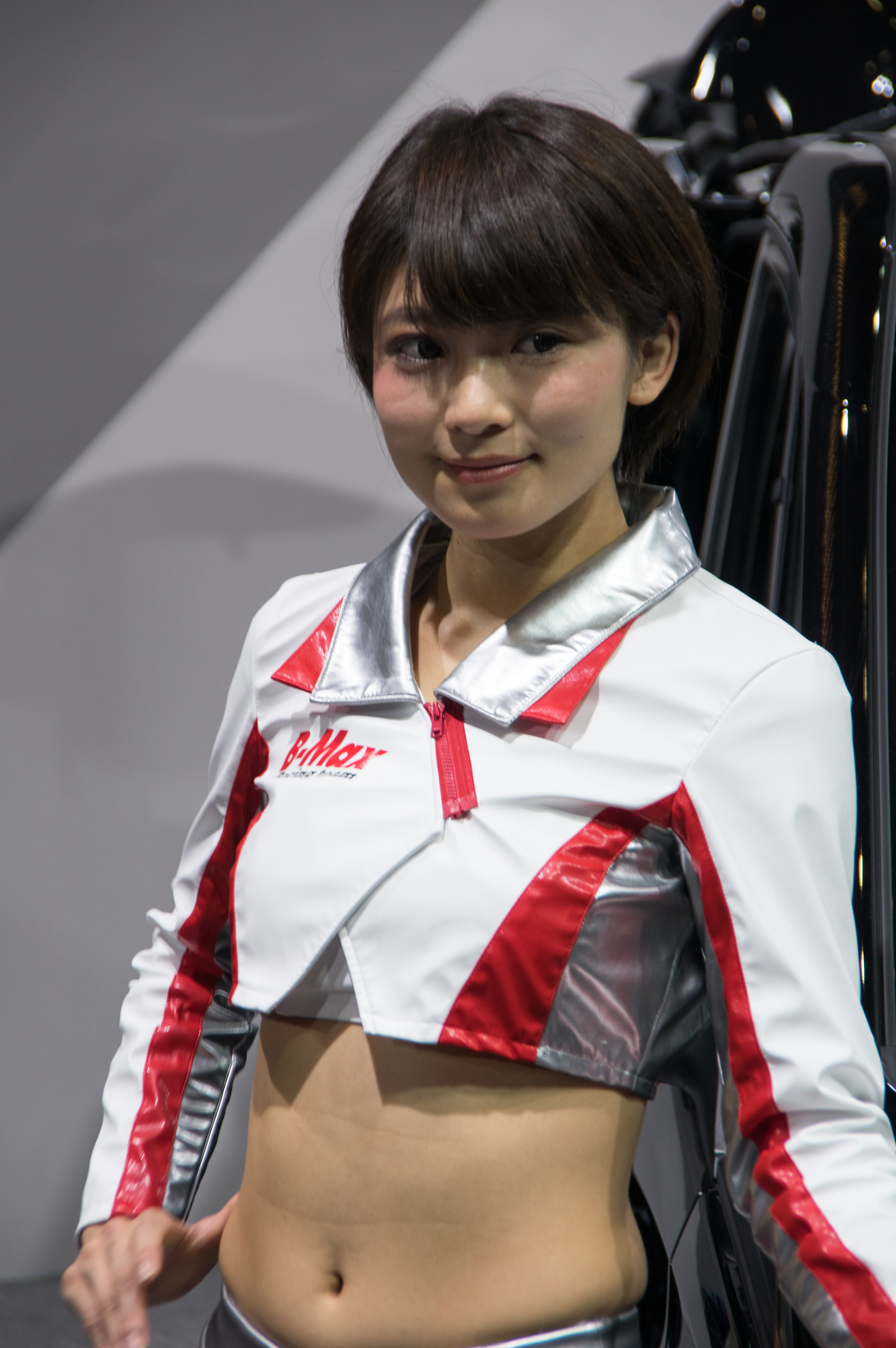 TOKYO AUTO SALON 2017 （東京オートサロン2017）-116.jpg